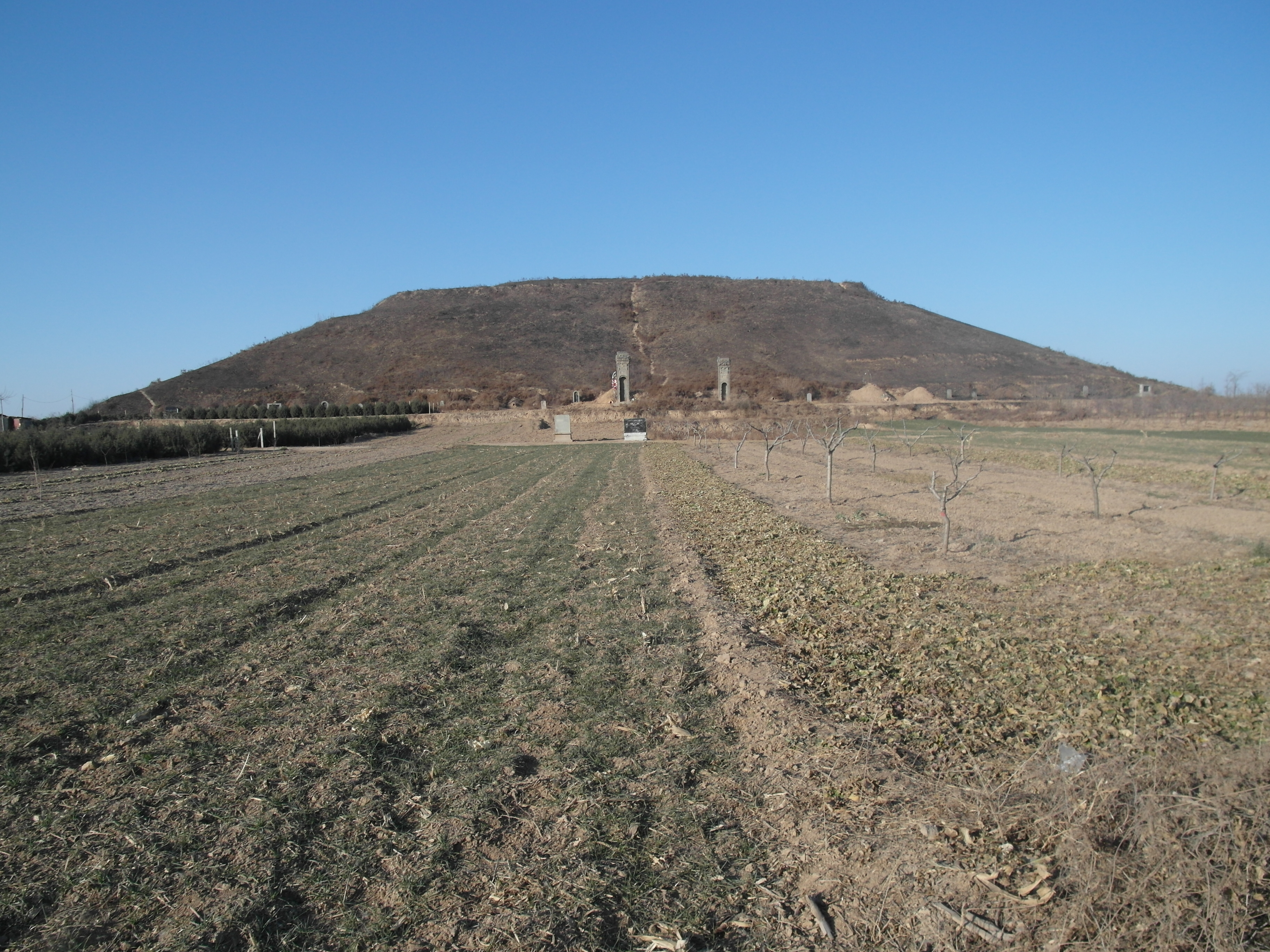 位于陕西省咸阳市北的五陵原上